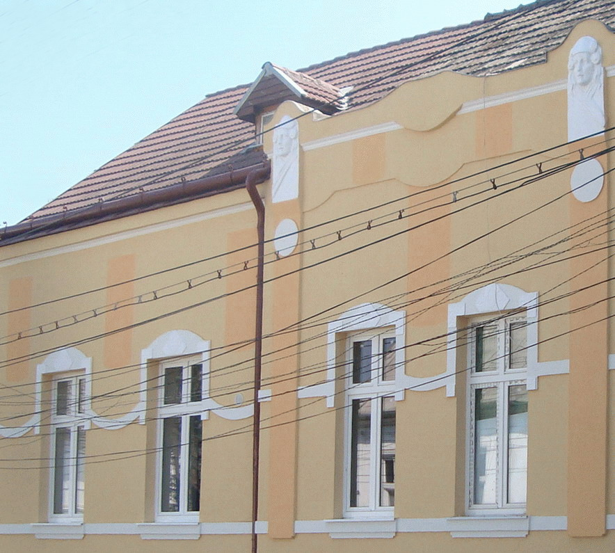 Turda - clădire în stil Secession (strada George Coşbuc nr.13)